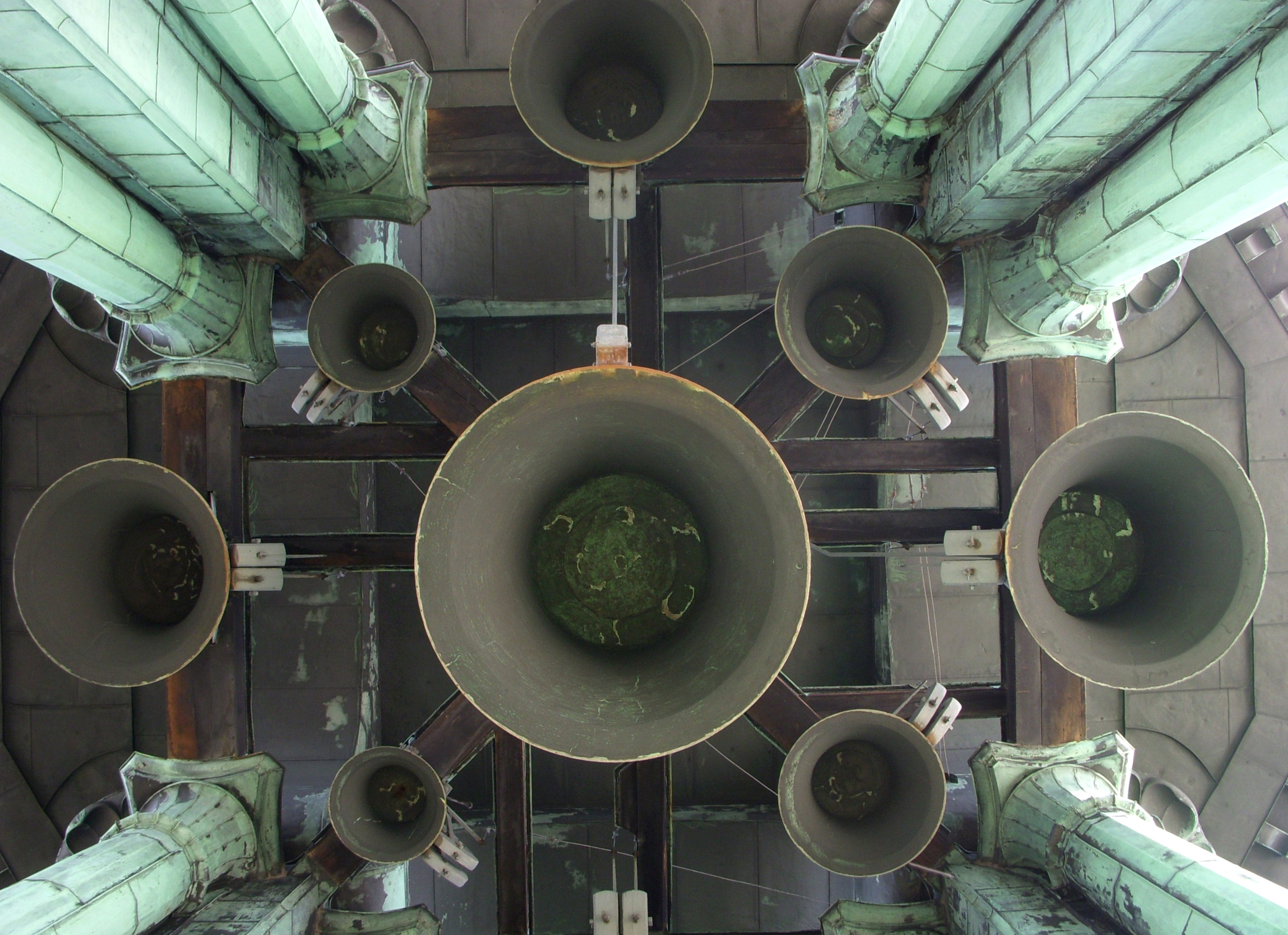 Stockholms stadshus, tornklockorna